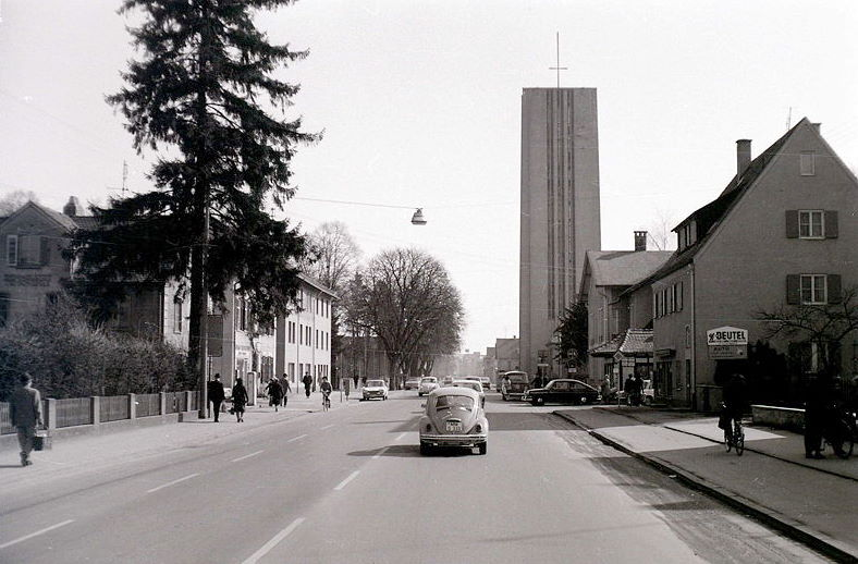 Mariä Himmelfahrt Memmingen in den 60er Jahren